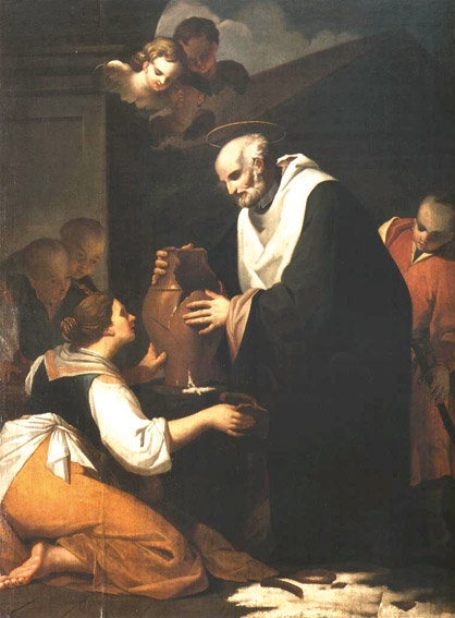 Św. Jan z Kęt